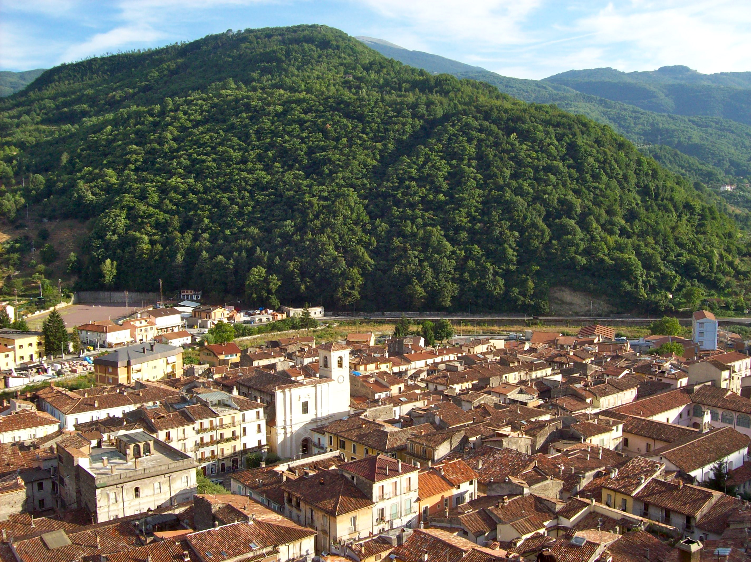 Antrodoco (Lazio)